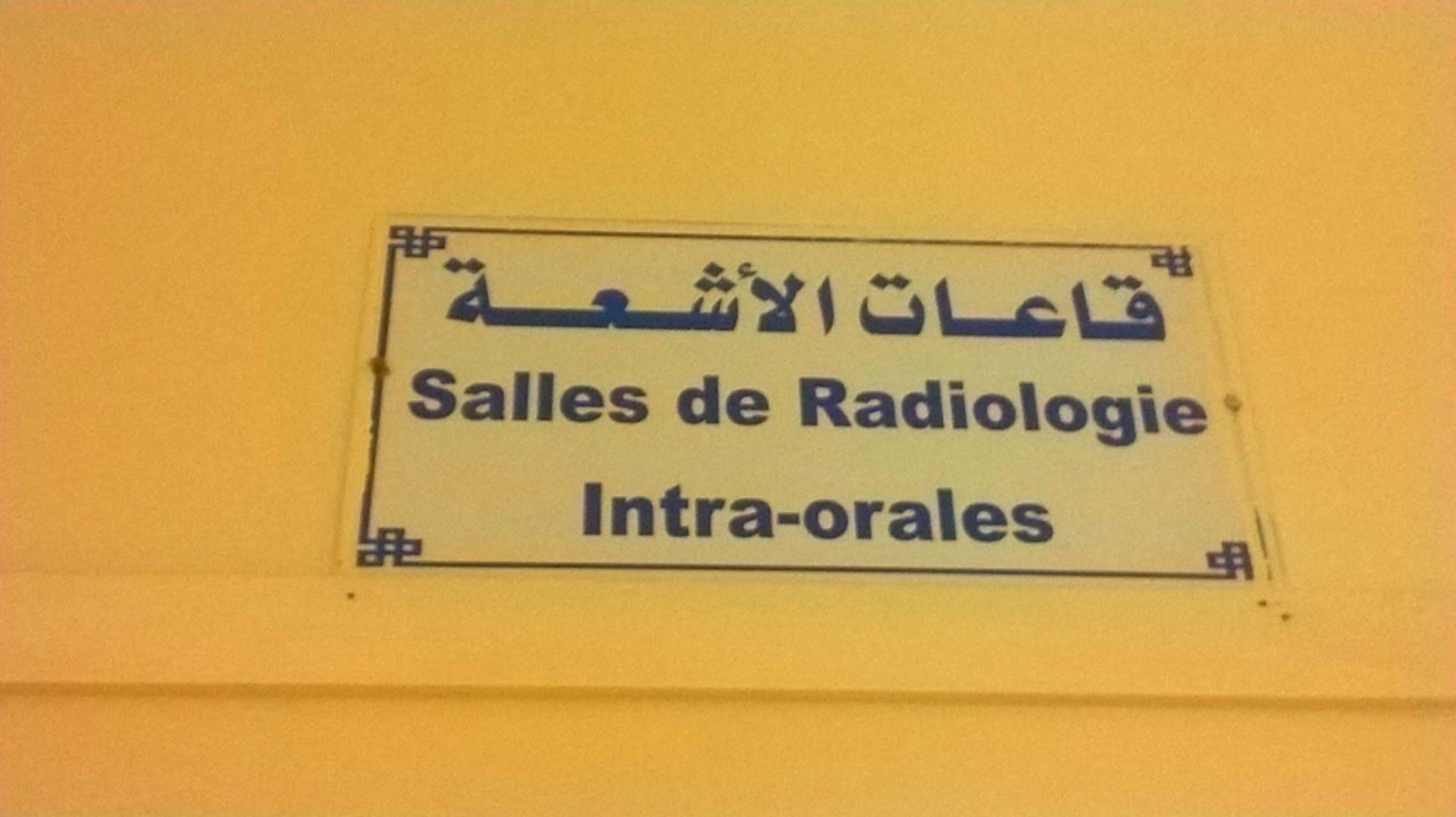 Clinique de médecine dentaire de Monastir, Monastir, Tunisie المصحة الاستشفائية الجامعية لطب الأسنان بالمنستير, المنستير، تونس